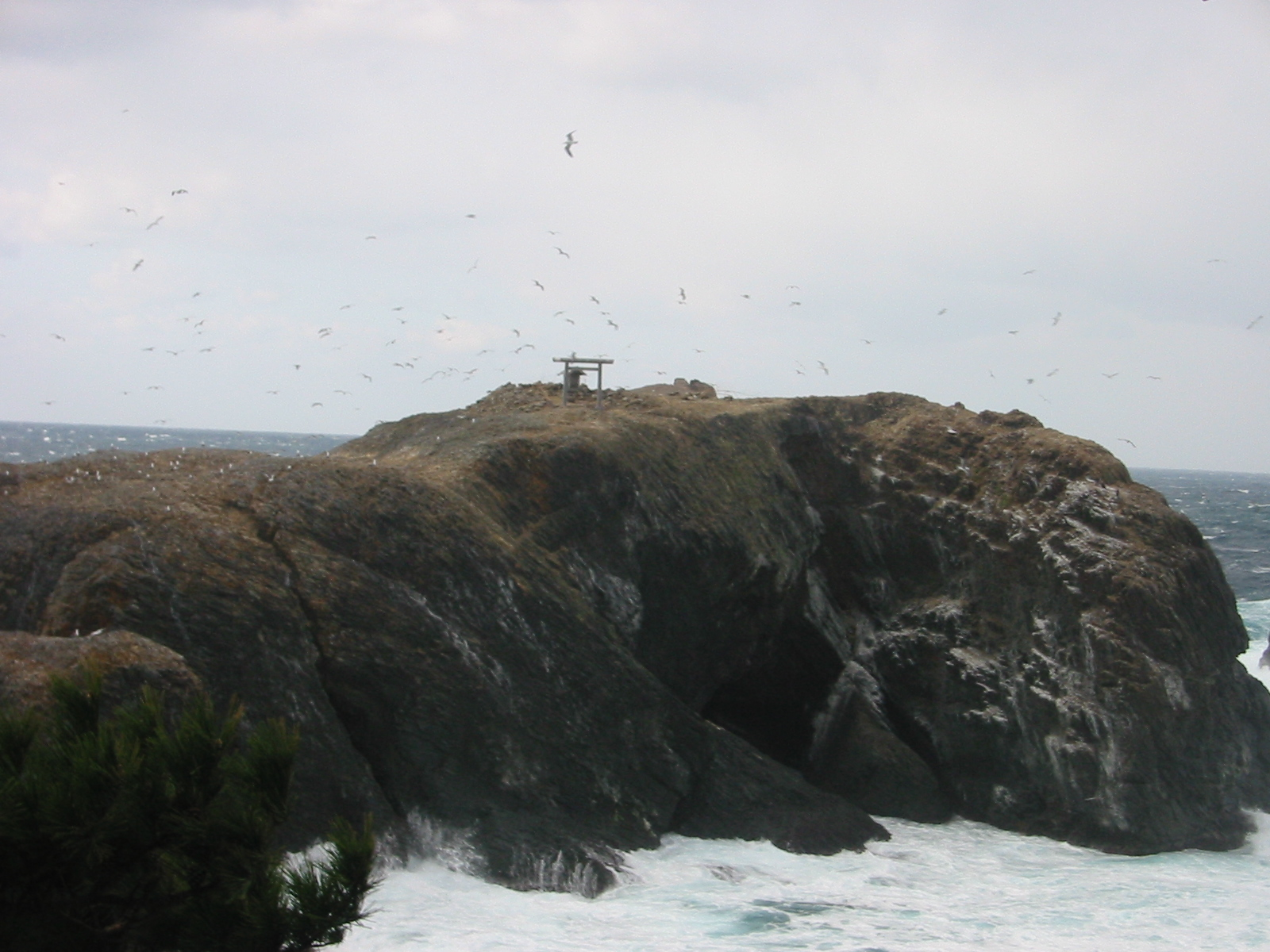 日御碕 経島（ふみしま）